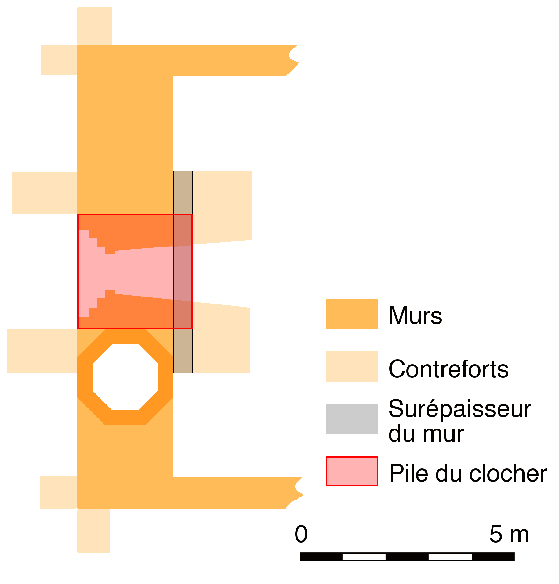 Plan du clocher-mur de la chapelle Notre-Dame-de-Kérinec, en Poullan-sur-Mer, dans le Finistère, en Bretagne. D'après un plan de Charles Chaussepied (1865-1930), reproduit dans Henri Waquet, « Chapelle Notre-Dame de Kérinec », dans Bulletin de la Société archéologique du Finistère, 1919, t. XLVI, p. 155.